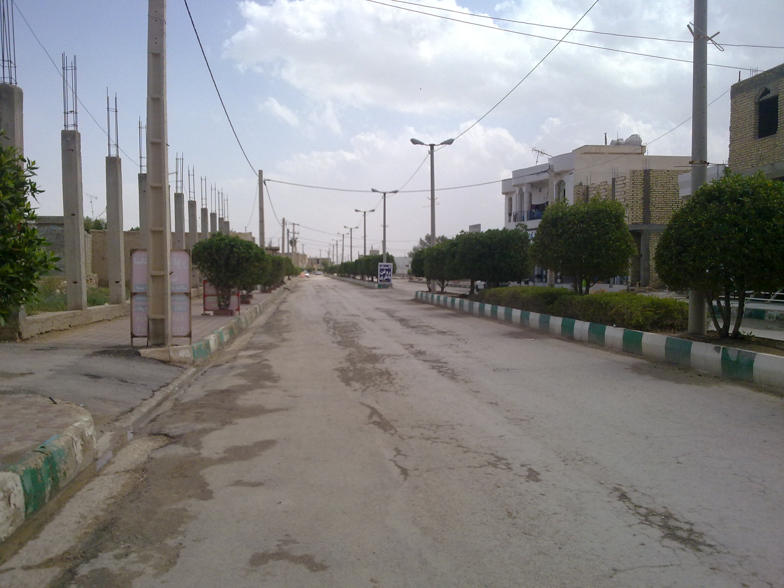 خیابان شهدا وراوی - از روبروی بانک ملت به سمت شرق